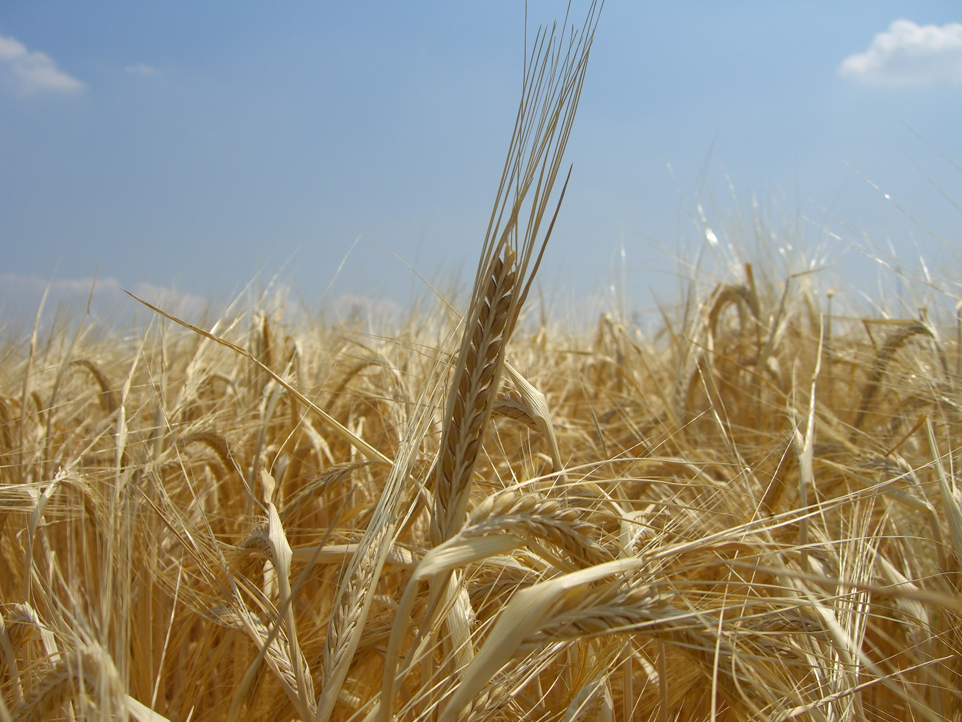 2-zeilige Sommergerste, Rheinhessen